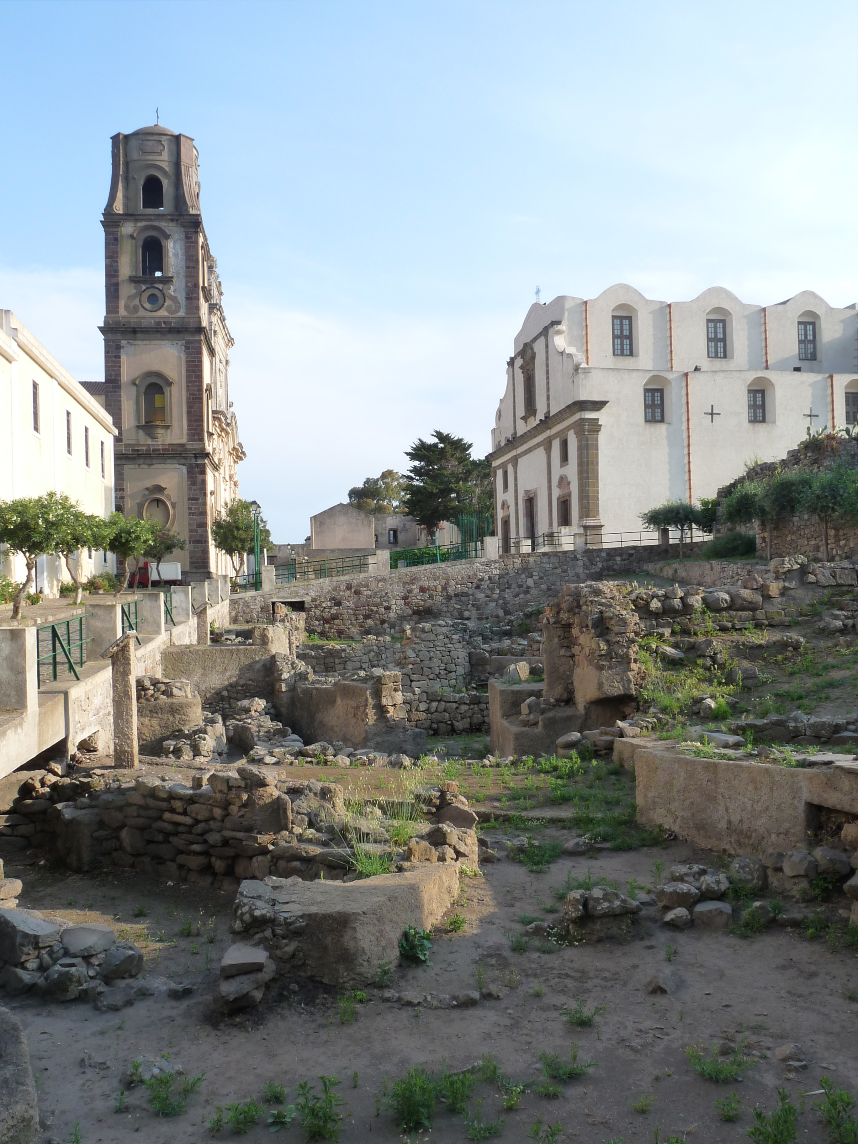 Parc archéologique de Lipari (îles Eoliennes, Sicile). A gauche, la cathédrale, à droite l'église dell'Immacolata.